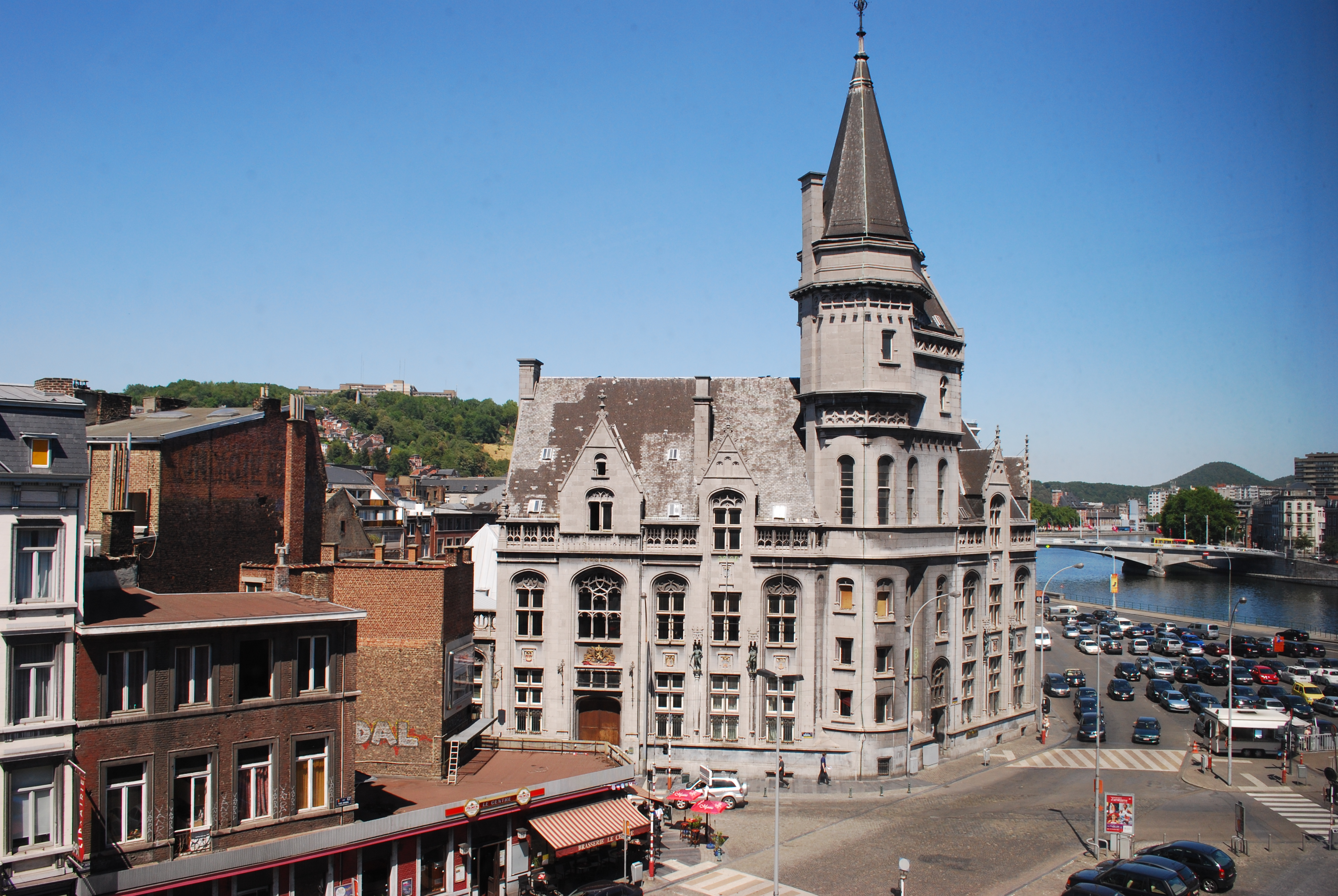 L'Ancienne Grand Poste de Liège.